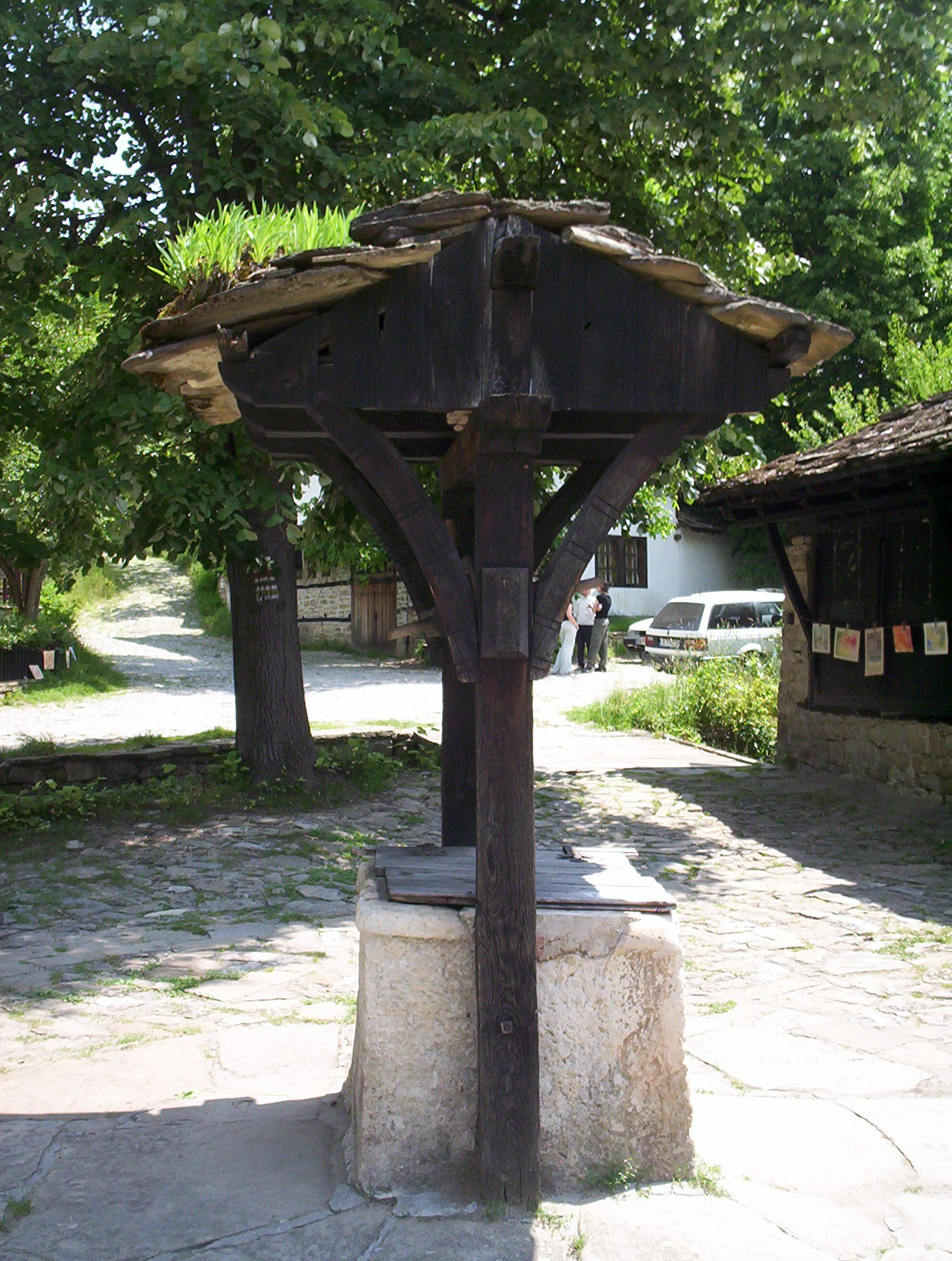 Кладенец